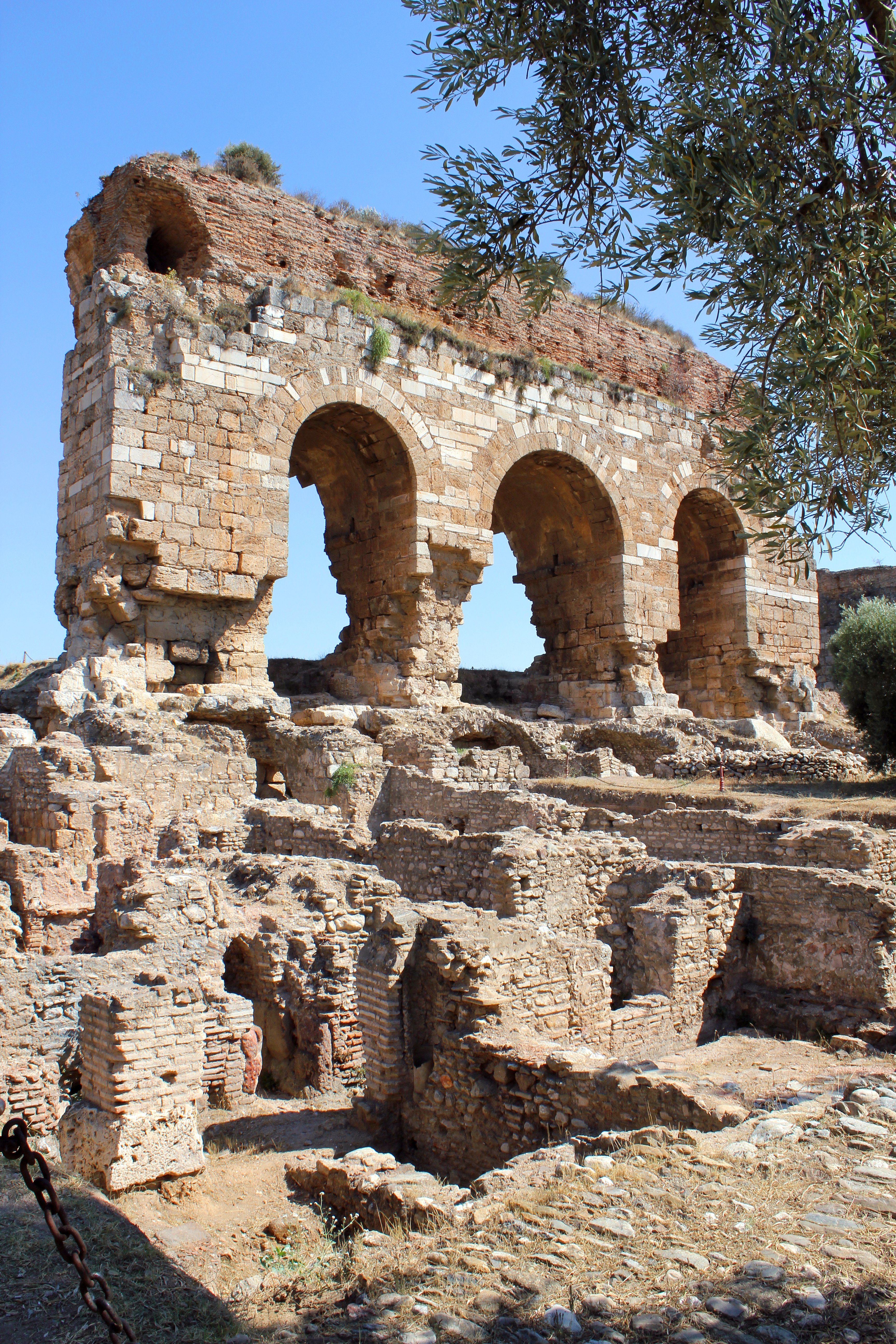 Ruinen eines Gymnasiumskomplexes in Tralles, Aydın, Westtürkei